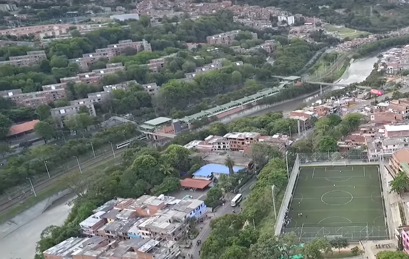 Estación Tricentenario (Metro de Medellín)